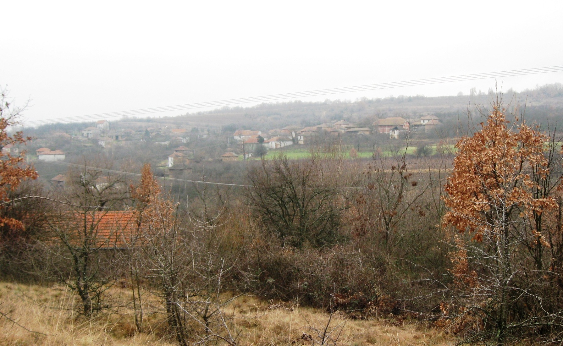 Lozane